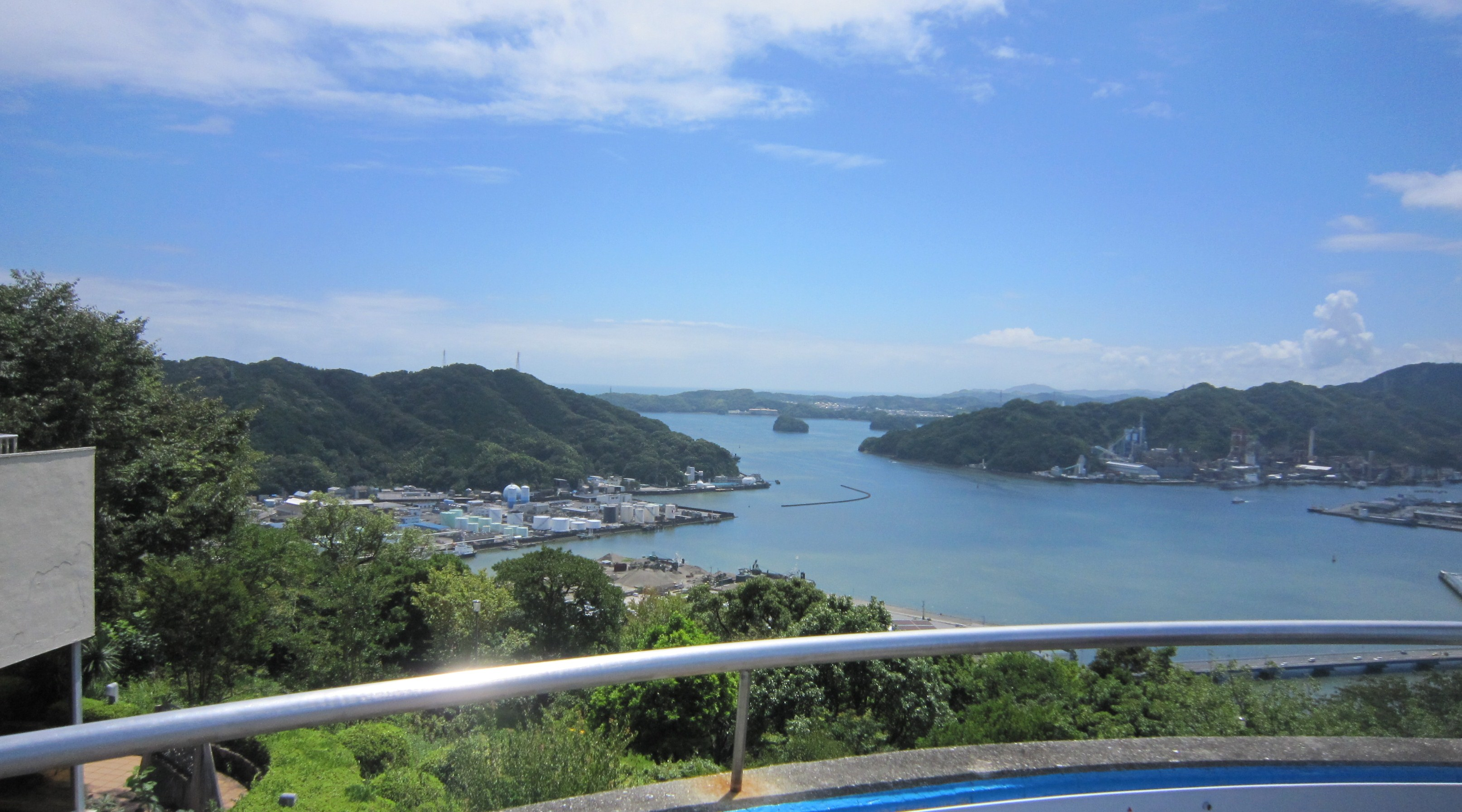 浦戸湾（五台山展望台より撮影）